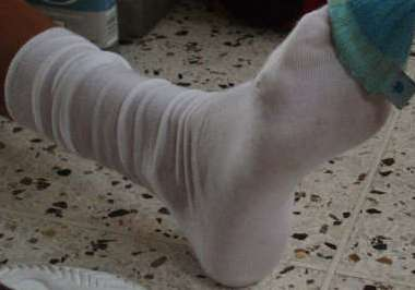 Calcetines blancos.